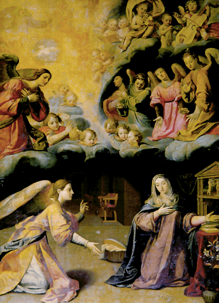 La Anunciación, de Antonio Mohedado, en la iglesia de la Anunciación de Sevilla, (España).